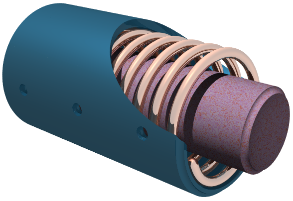 Information: Description = Schéma de principe d'un transducteur magnétostrictif. Source = créé avec Povray 3.5, annoté avec 2 Date = 2005-12-30 Author = Syntex